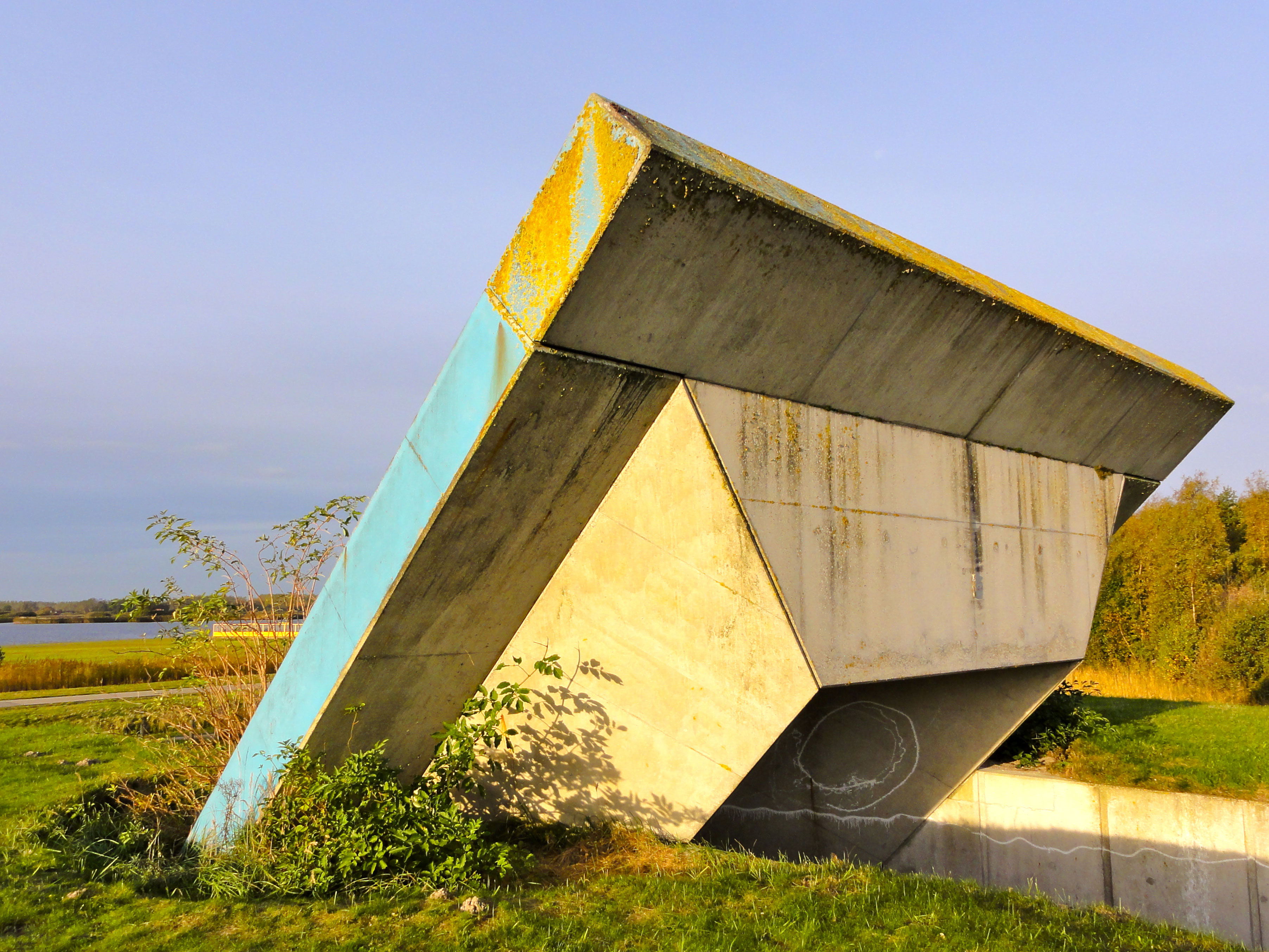 De Poort nabij Lauwersoog 1996 door Onco Tattje